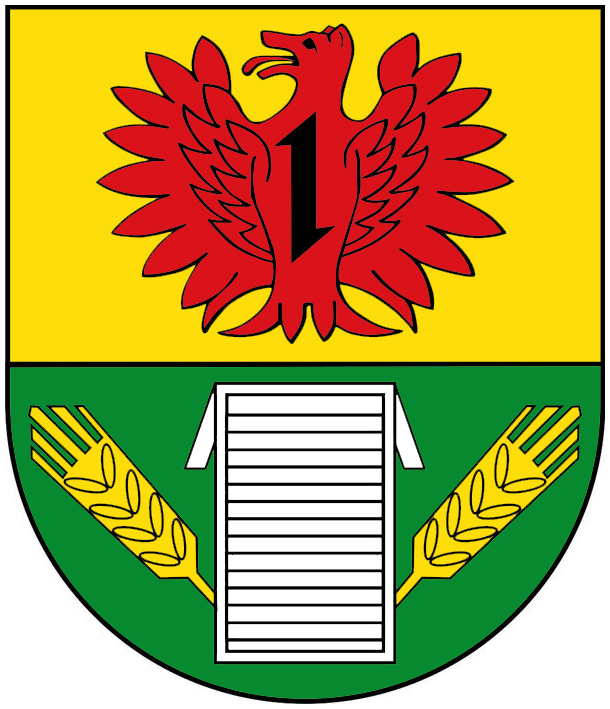 Wappen von Weitersbach